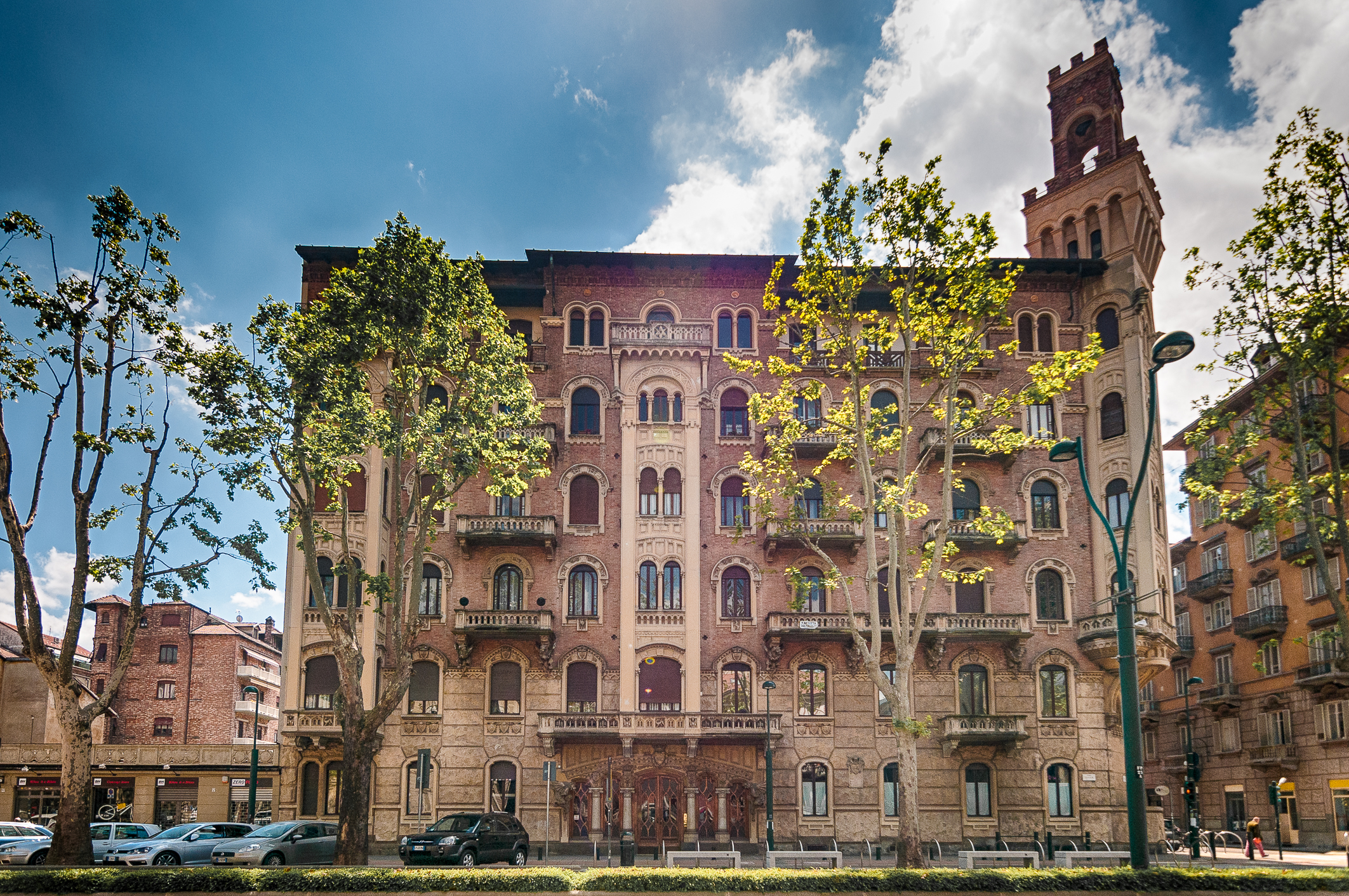 Palazzo della Vittoria